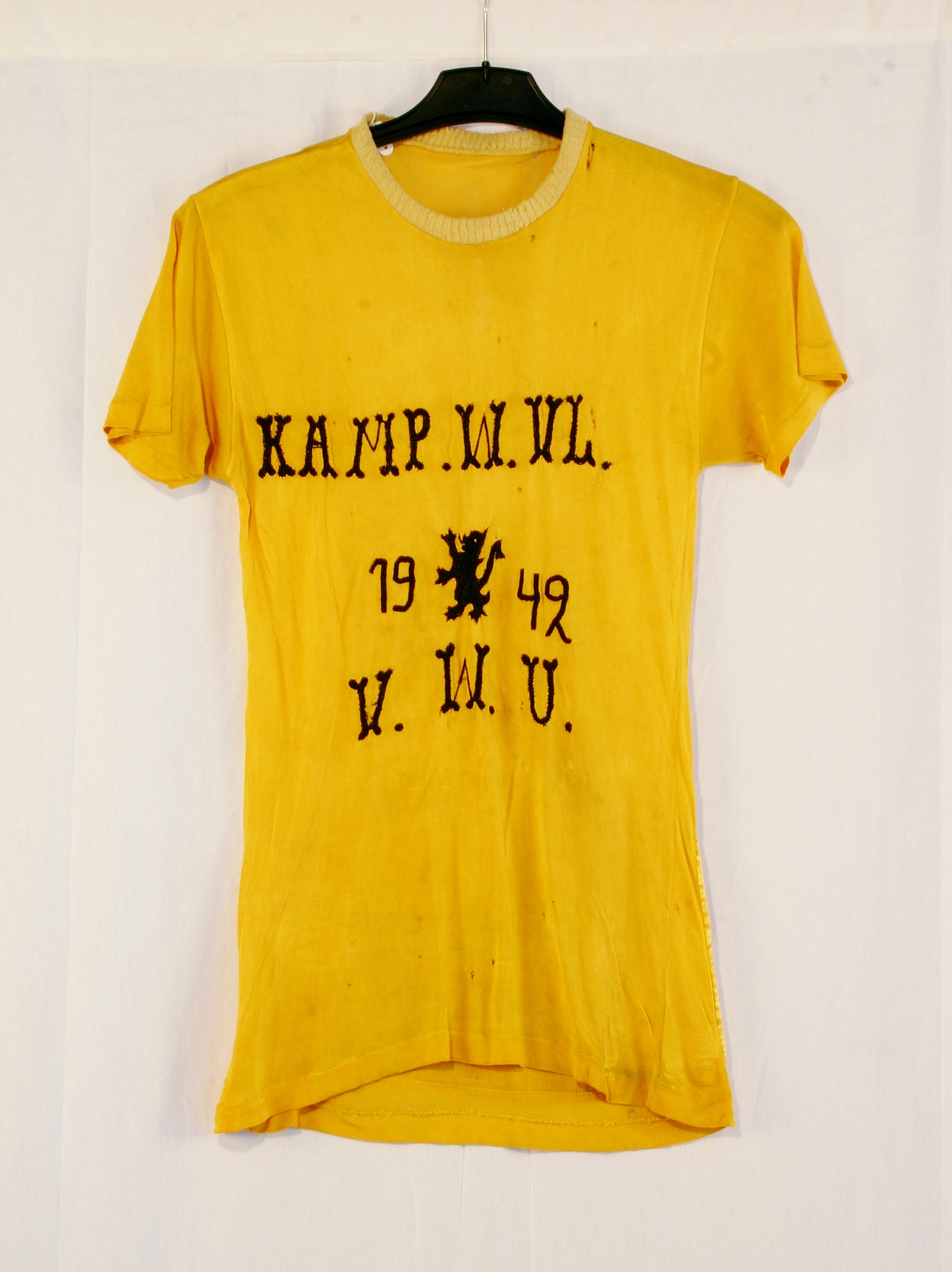 Wielertrui van Norbert Callens ontvangen als West-Vlaams kampioen bij de junioren bij de Vlaamsche Wieler Unie in 1942 (collectie KOERS. Museum van de Wielersport - Roeselare)